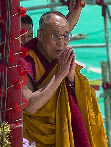 Ladakh